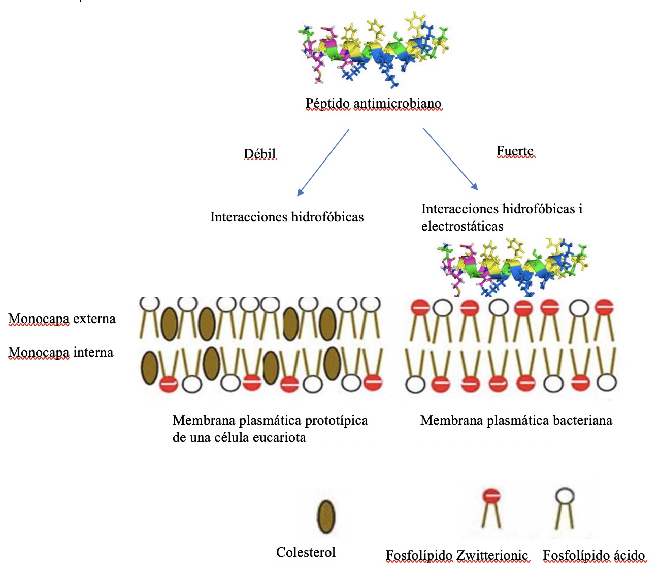 Mecanismo de selectividad de los péptidos antimicrobianos